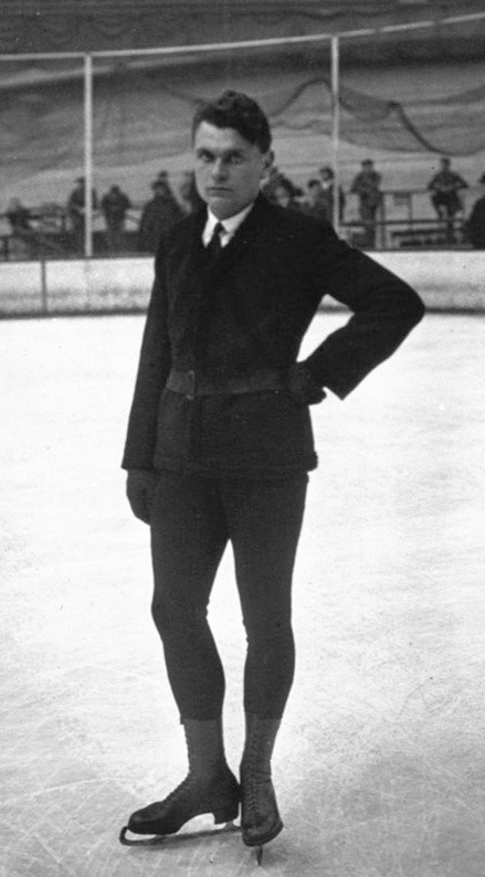 Palais des Sports : Championnats d'Europe : Hugo Disler : [photographie de presse] / Agence Meurisse